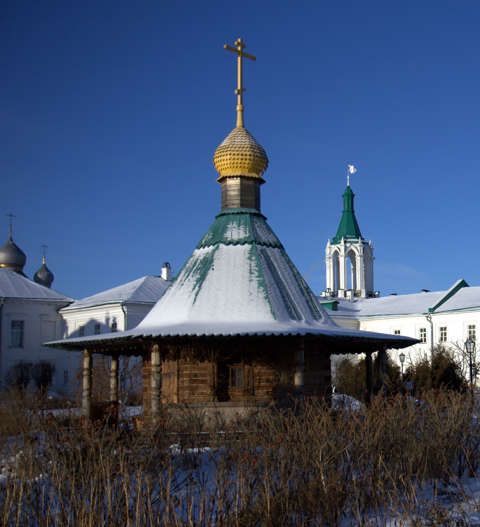 Святой источник в Спасо-Яковлевском монастыре (Ростов)